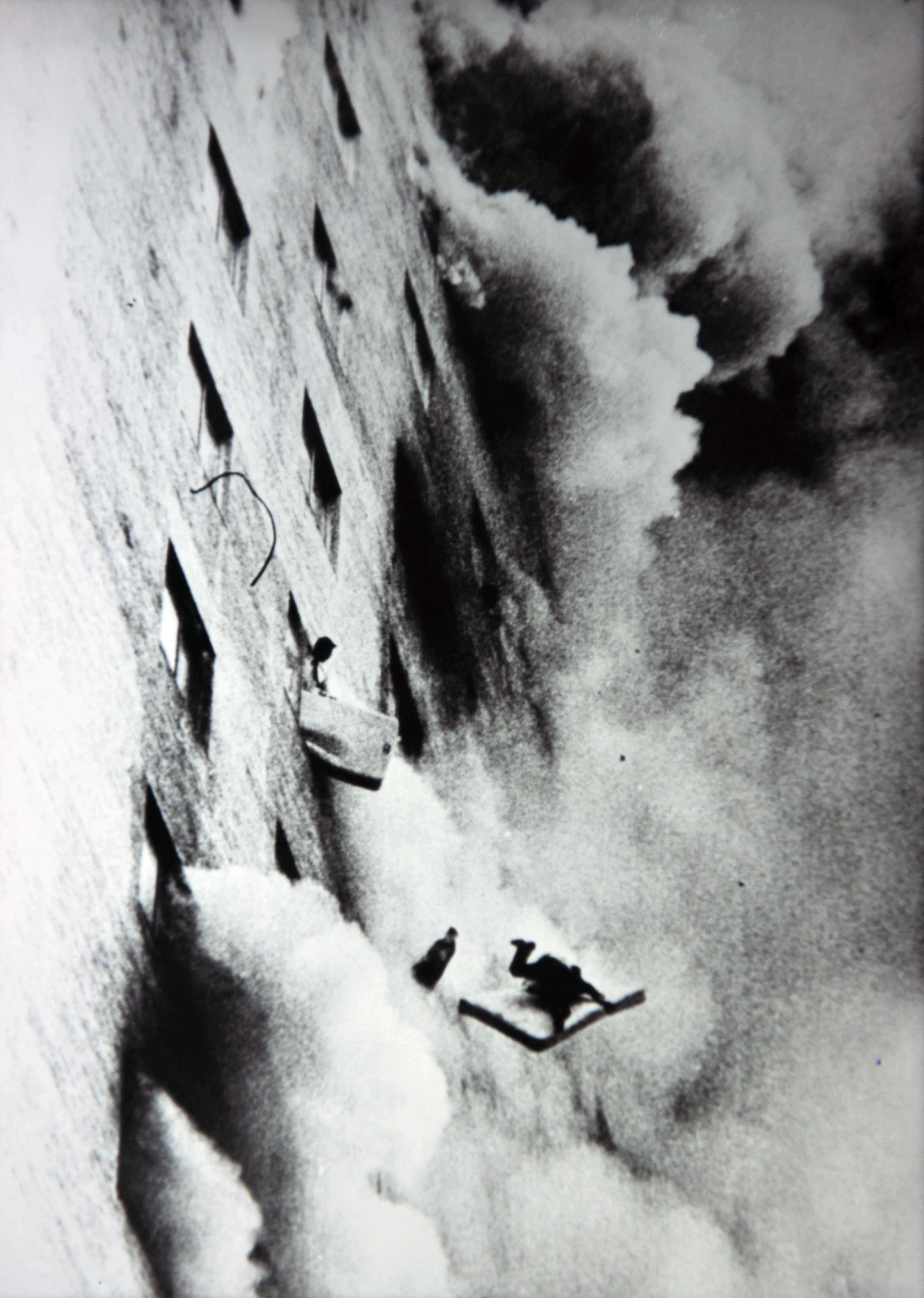 서울특별시 소방재난본부 소장 사진. photos of Seoul Metropolitan Fire & Disaster Headquarters. 이 파일은 크리에이티브 커먼즈 저작자표시-동일조건변경허락 4.0 국제 라이선스로 배포됩니다. 단 누구인지 구별 가능한 특정 인물이 사진에 포함되어 있을 경우 사용 전에 서울특별시 소방재난본부 및 해당 인물의 승인을 받으셔야합니다. 감사합니다. evidence of permission